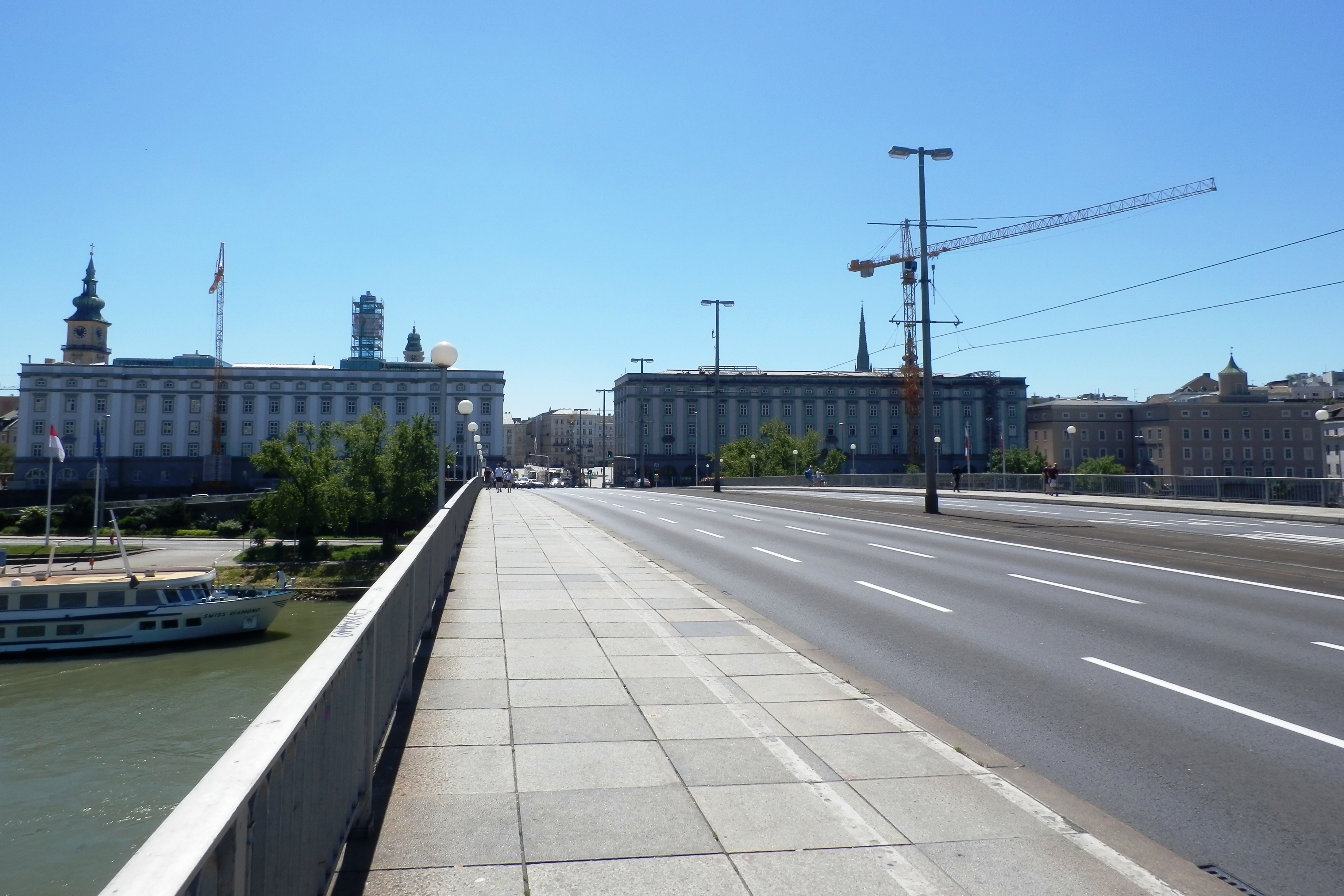 Nibelungenbrücke und Brückenkopf Linz